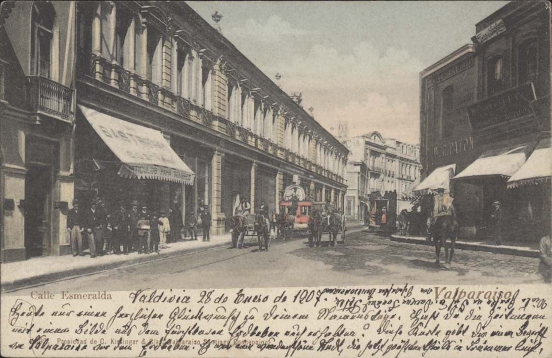 Postal de Calle Esmeralda